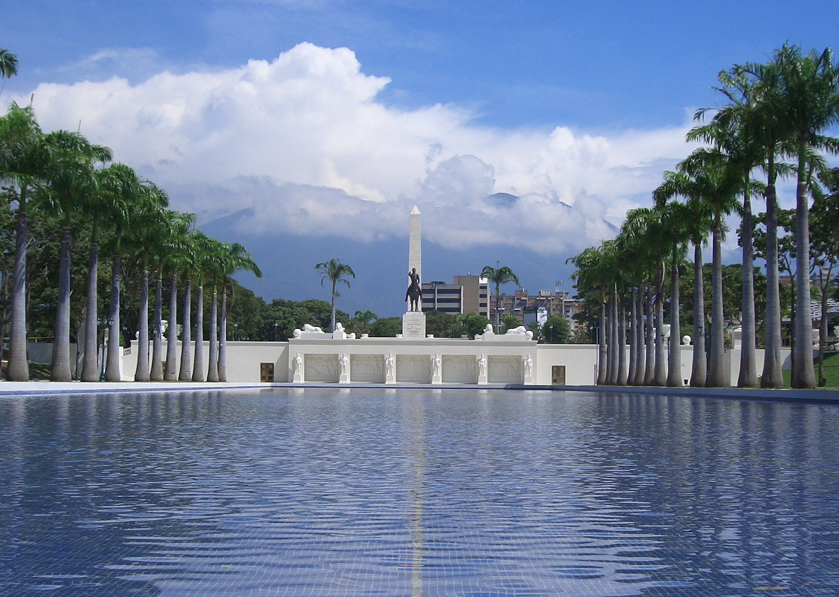 Espejo Acuático, Paseo Los Próceres, Caracas, Venezuela.